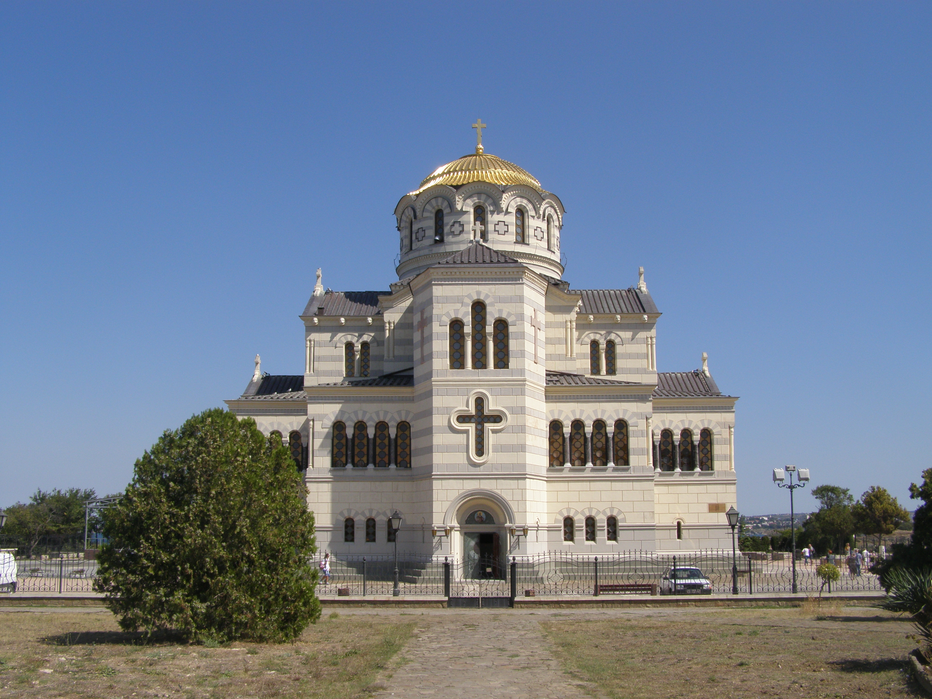 Херсонес Таврический, Севастополь, Россия